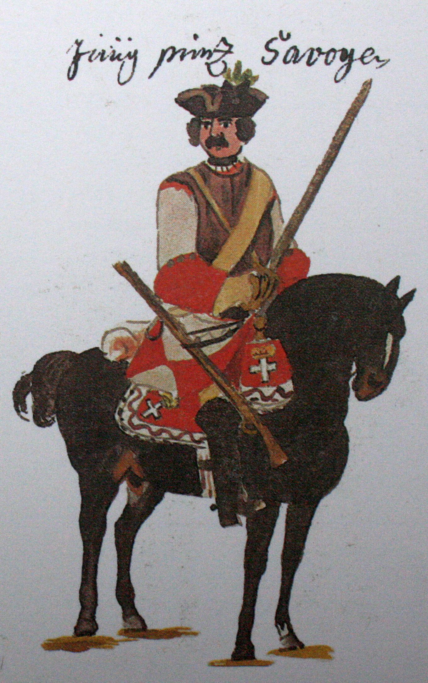 Kaiserliches_Kürassierregiment_K_2_1734_Gudenushandschrift